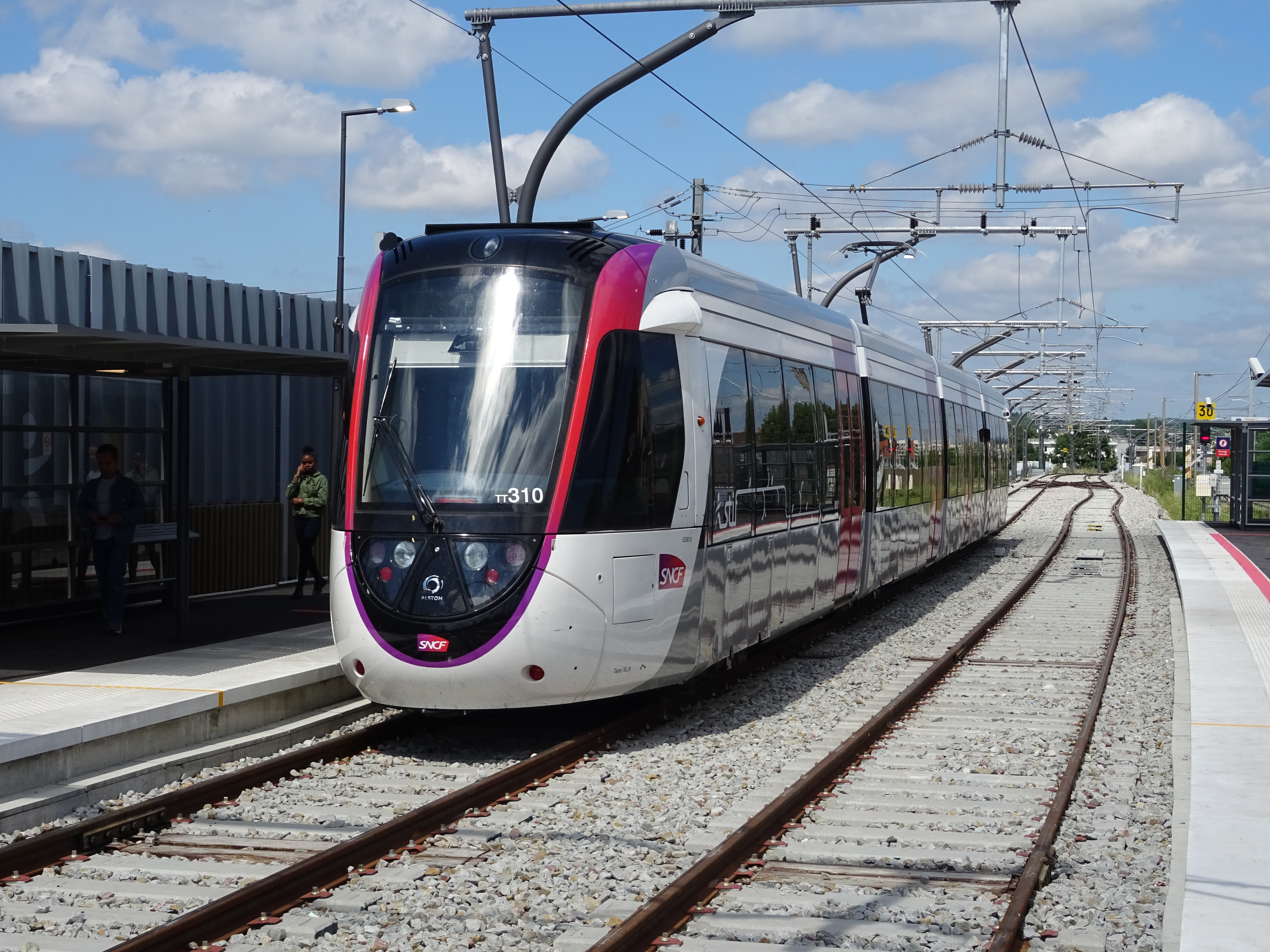 U 53600 à quai au terminus d'Epinay-sur-Seine